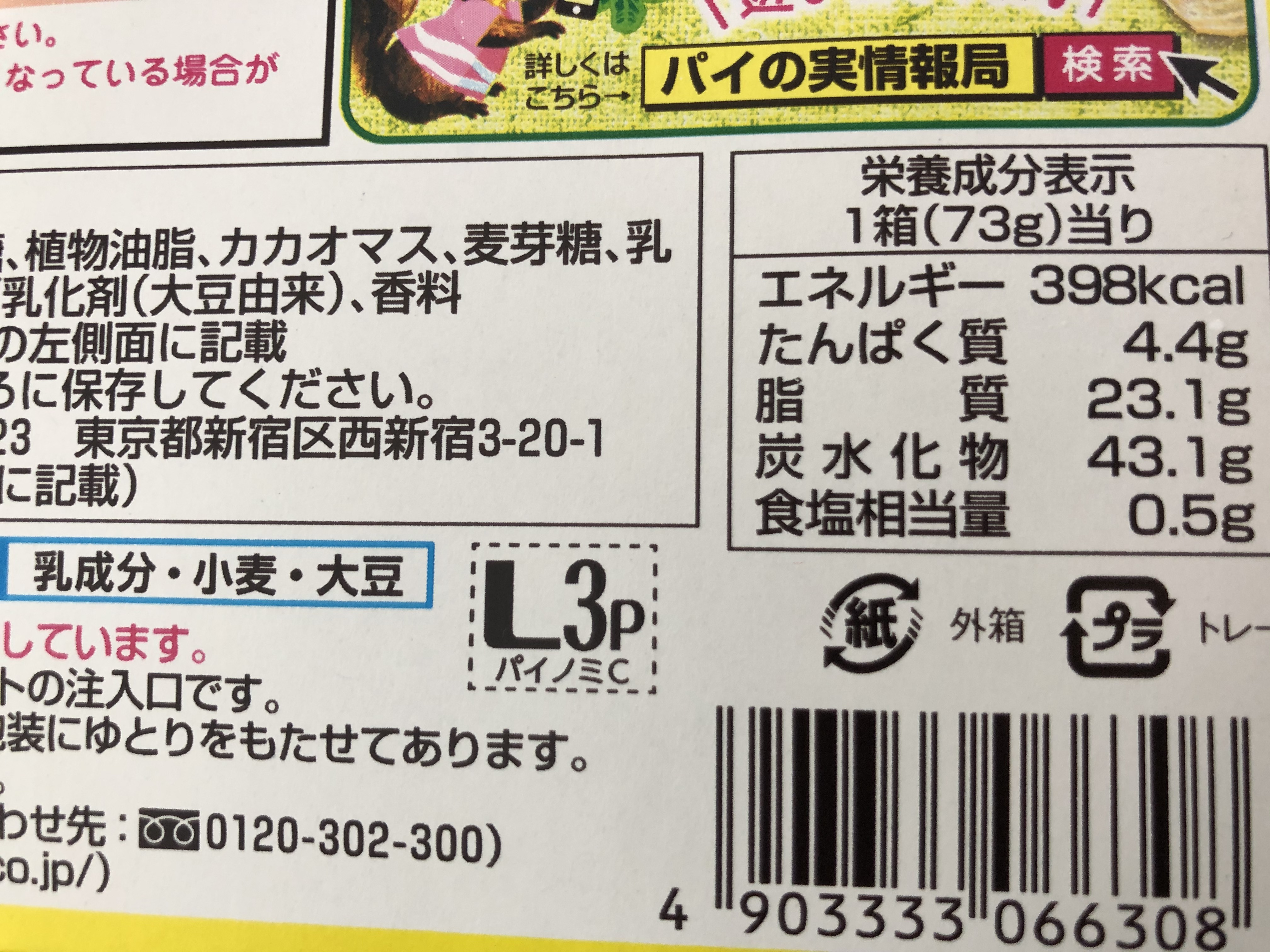 ロッテ パイの実の外箱にあったLマーク(2019年3月の製品)